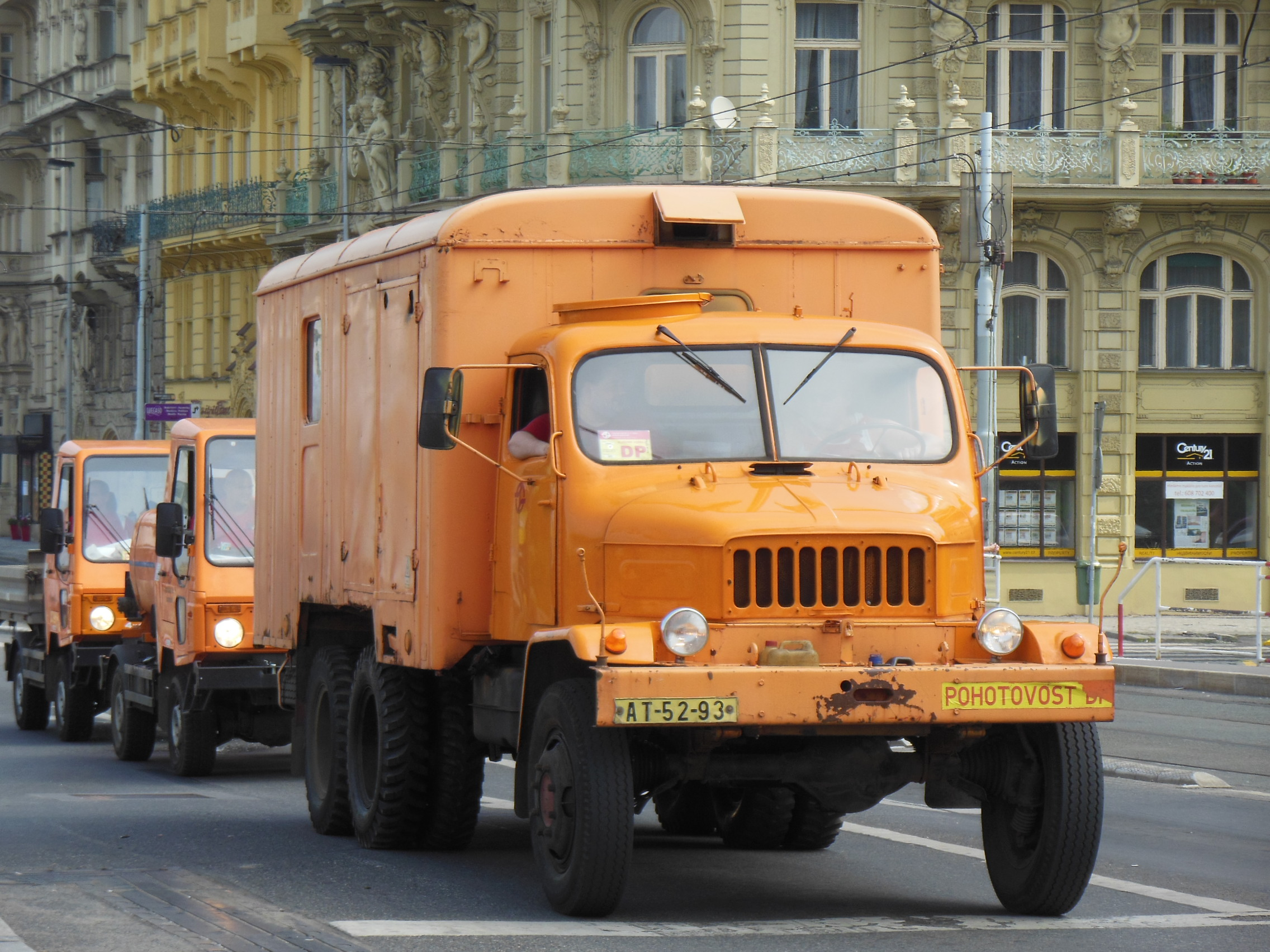 Vozidlo Dopravního podniku hl. m. Prahy Praga V3S na Jiráskově náměstí na Novém Městě v Praze.